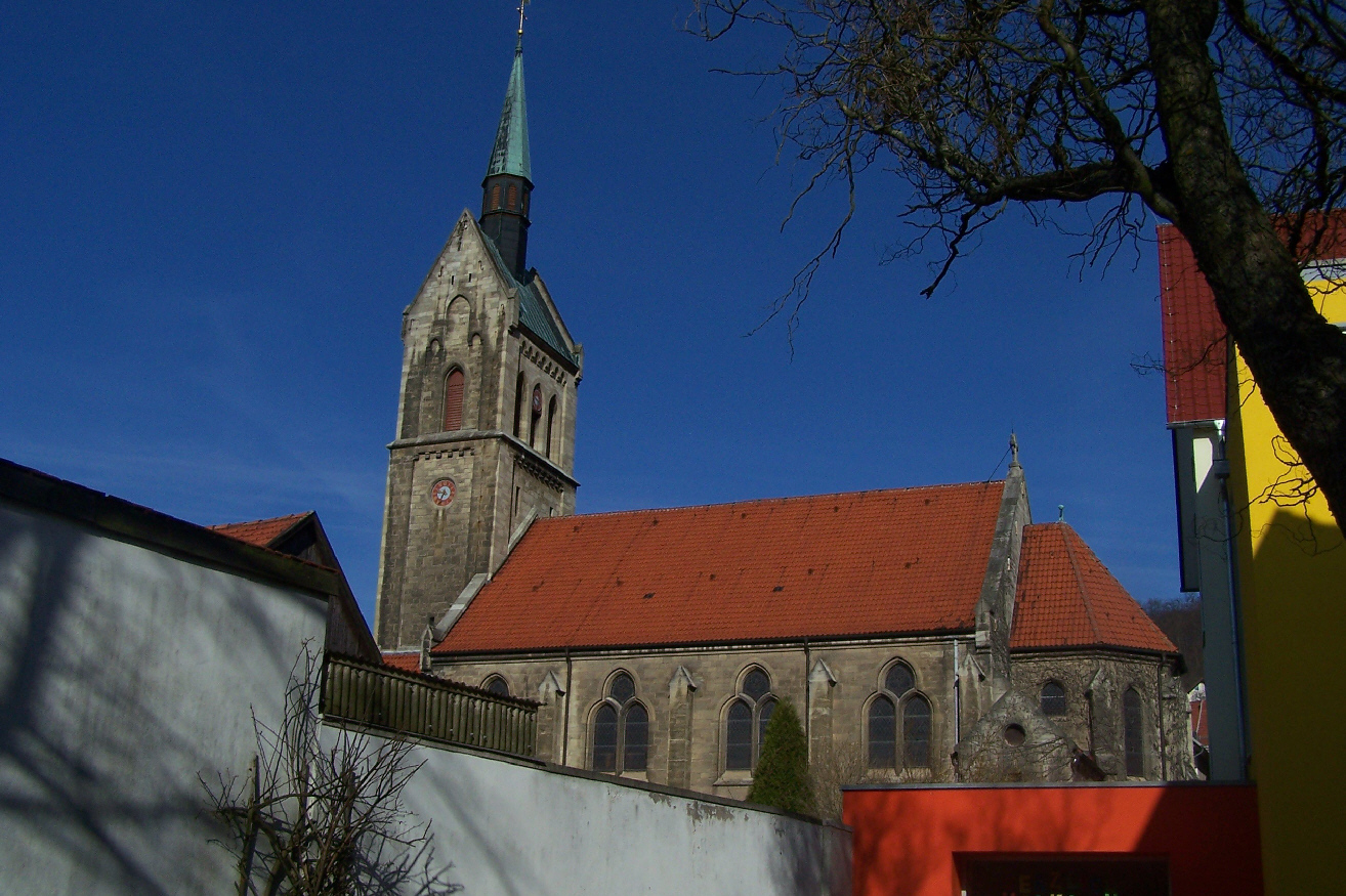 Die Kirche von Heyerode im Obereichsfeld.